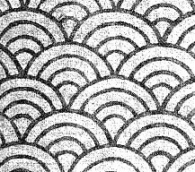 ゆかた